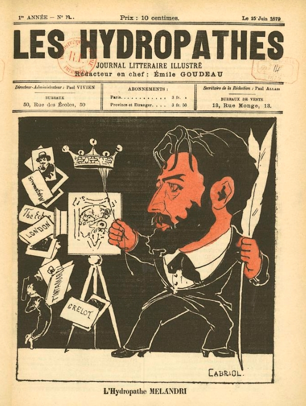 Les Hydropathes, n°12 du 15 juin 1879. Achille Mélandri caricature de Cabriol (Georges Lorin). Numérisation sur le site Gallica.